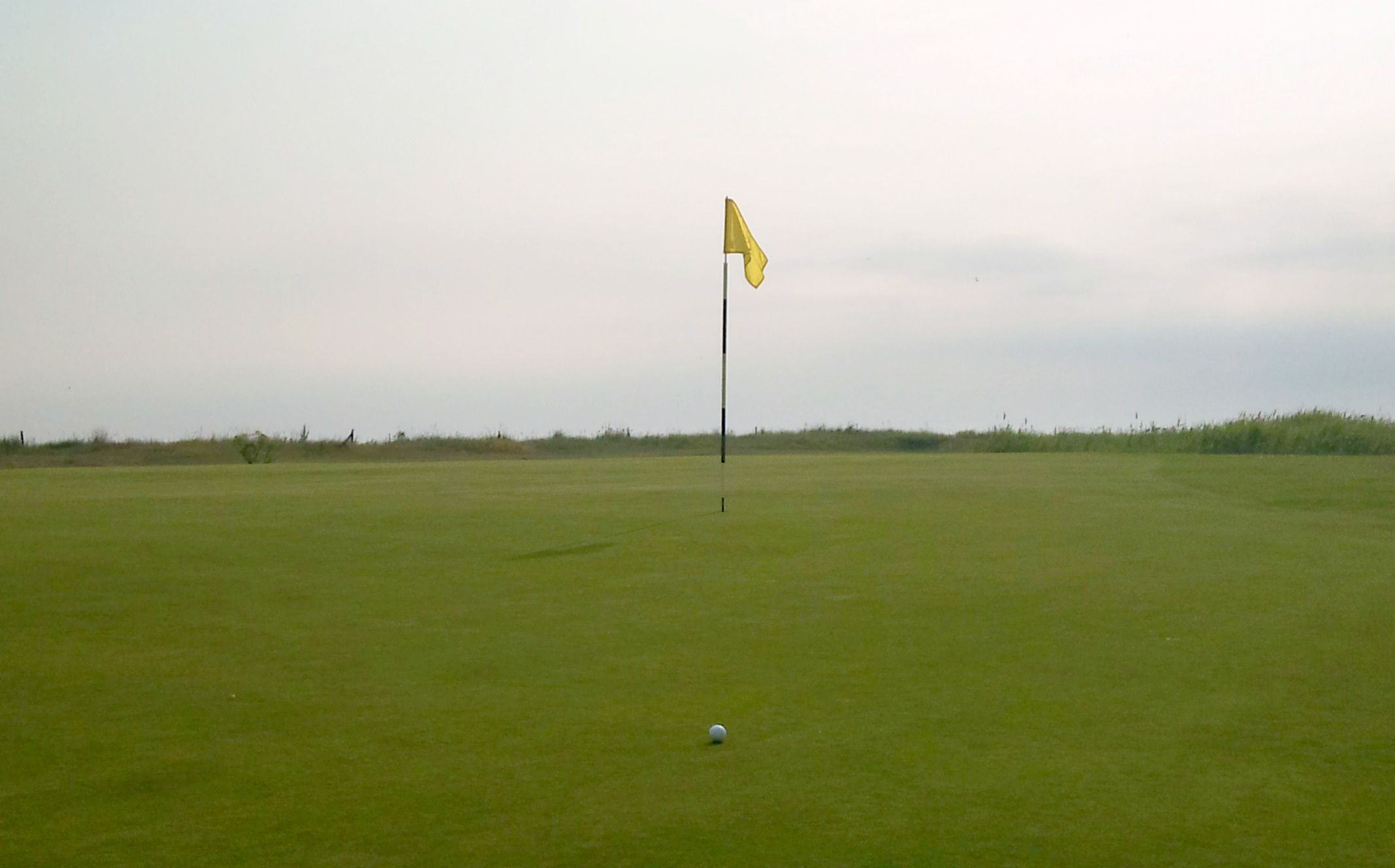 Ljunghusens golfklubb Ljunghusens GK 23:e green